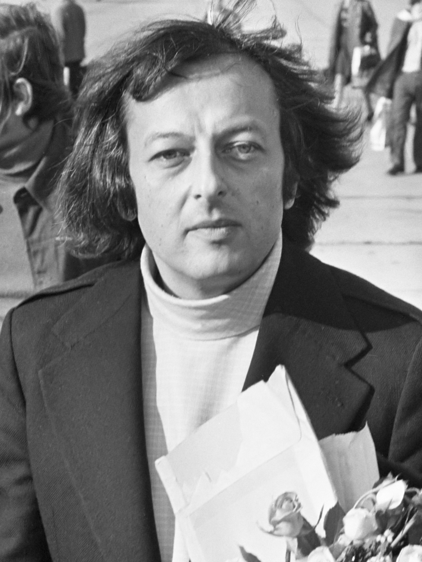 Dirigent André Previn op vliegveld Zestienhoven 26 oktober 1973